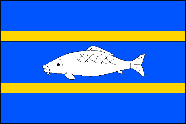 vlajka, Vatín, okres Žďár nad Sázavou